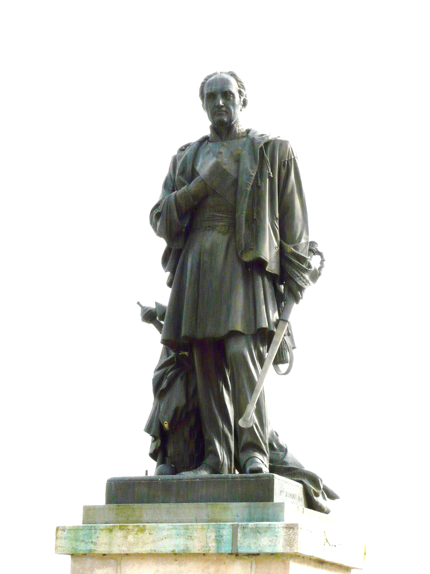 La statue du maréchal Bugeaud, Excideuil, Dordogne, France. Œuvre d'Augustin (ou Auguste) Dumont (1801-1884).